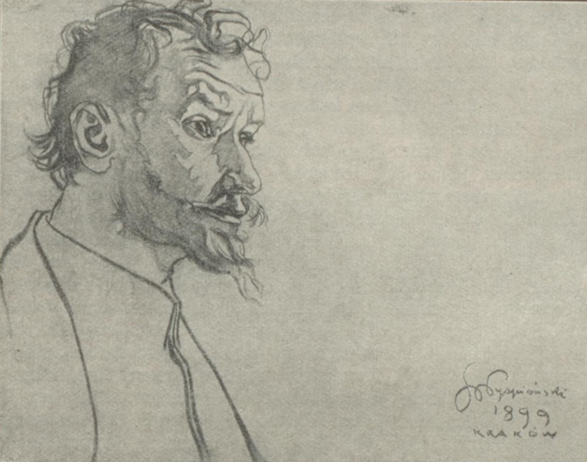 Stanisław Wyspiański Stanisław Przybyszewski 1899 in die Kunst für Alle 1908